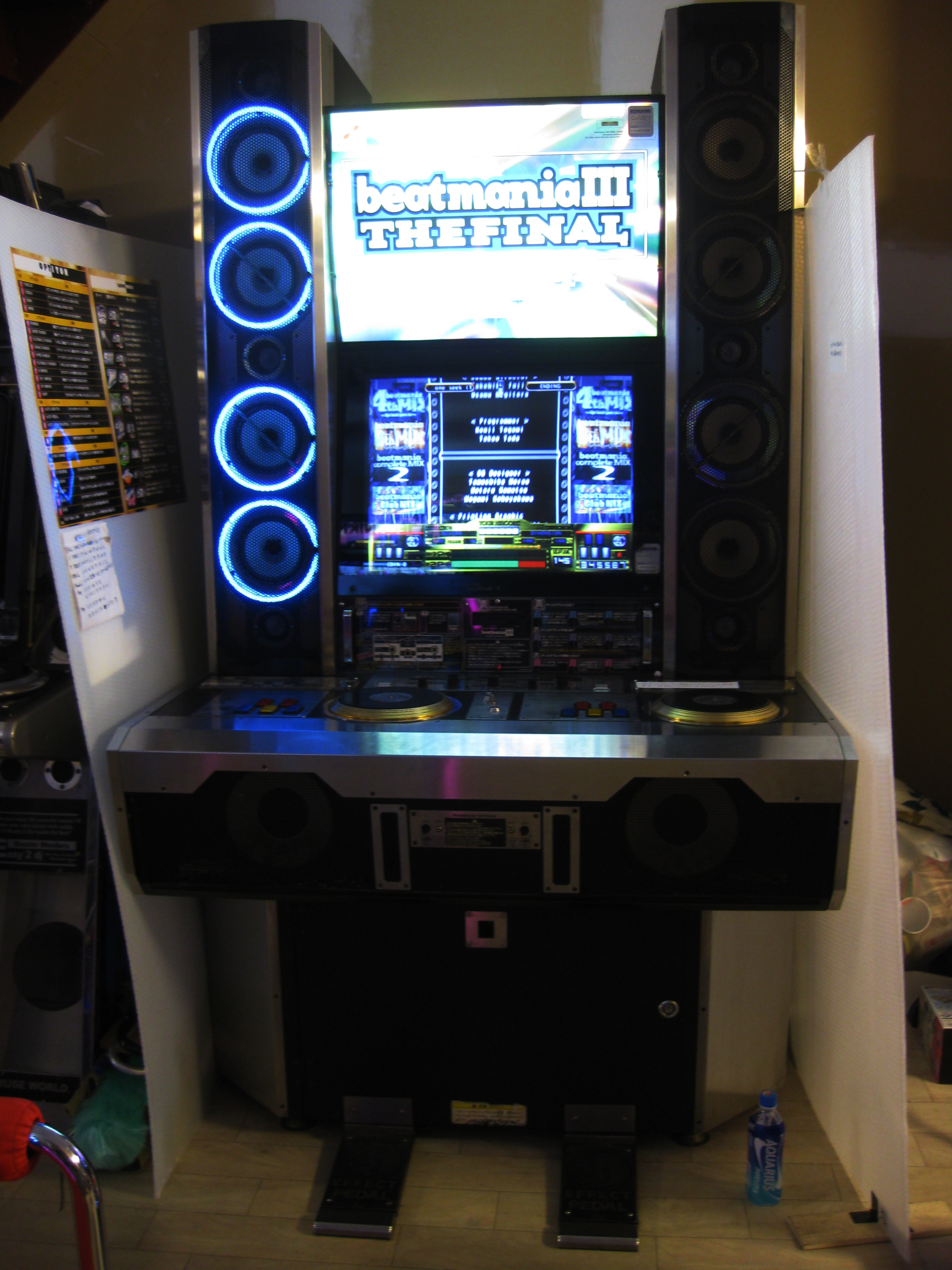 beatmania III筐体参考写真